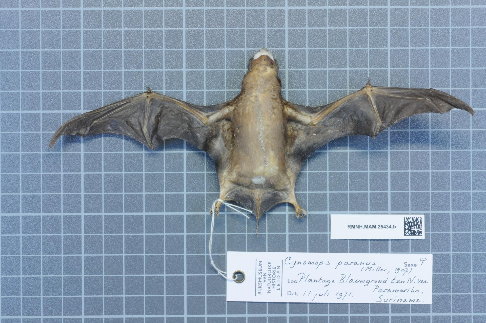 Cynomops paranus